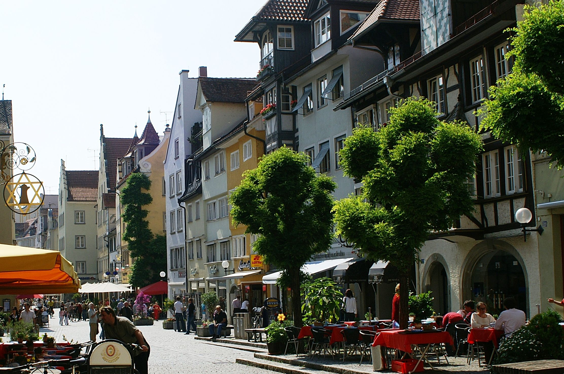 Lindau (Bodensee)